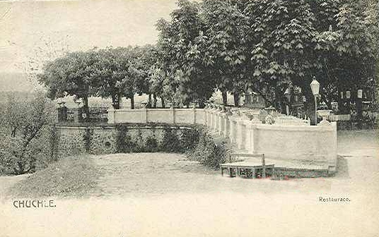 Oberes Restaurant in Kuchelbad (Chuchle)